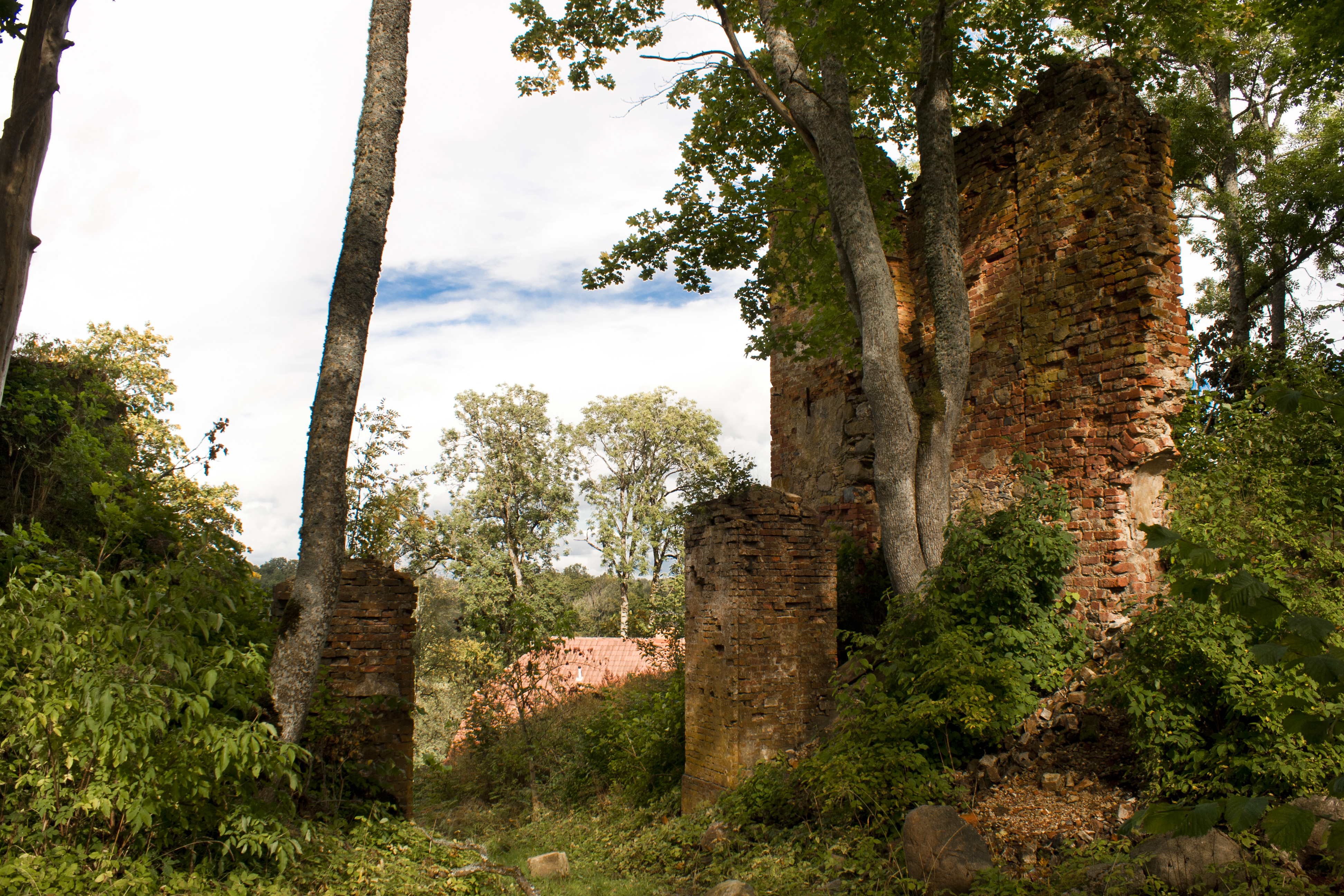 Embūtes viduslaiku pils, Embūte